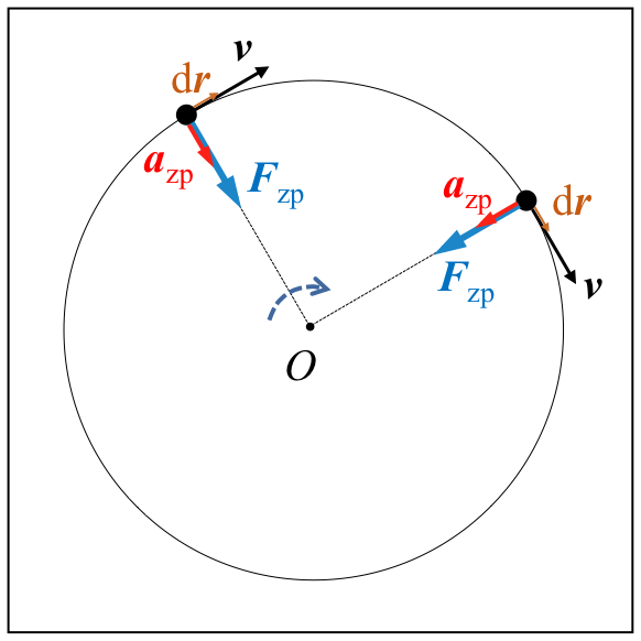 Higidura zirkular uniformean indar zentripetuak lanik egiten ez duela erakusten duen grafikoa.